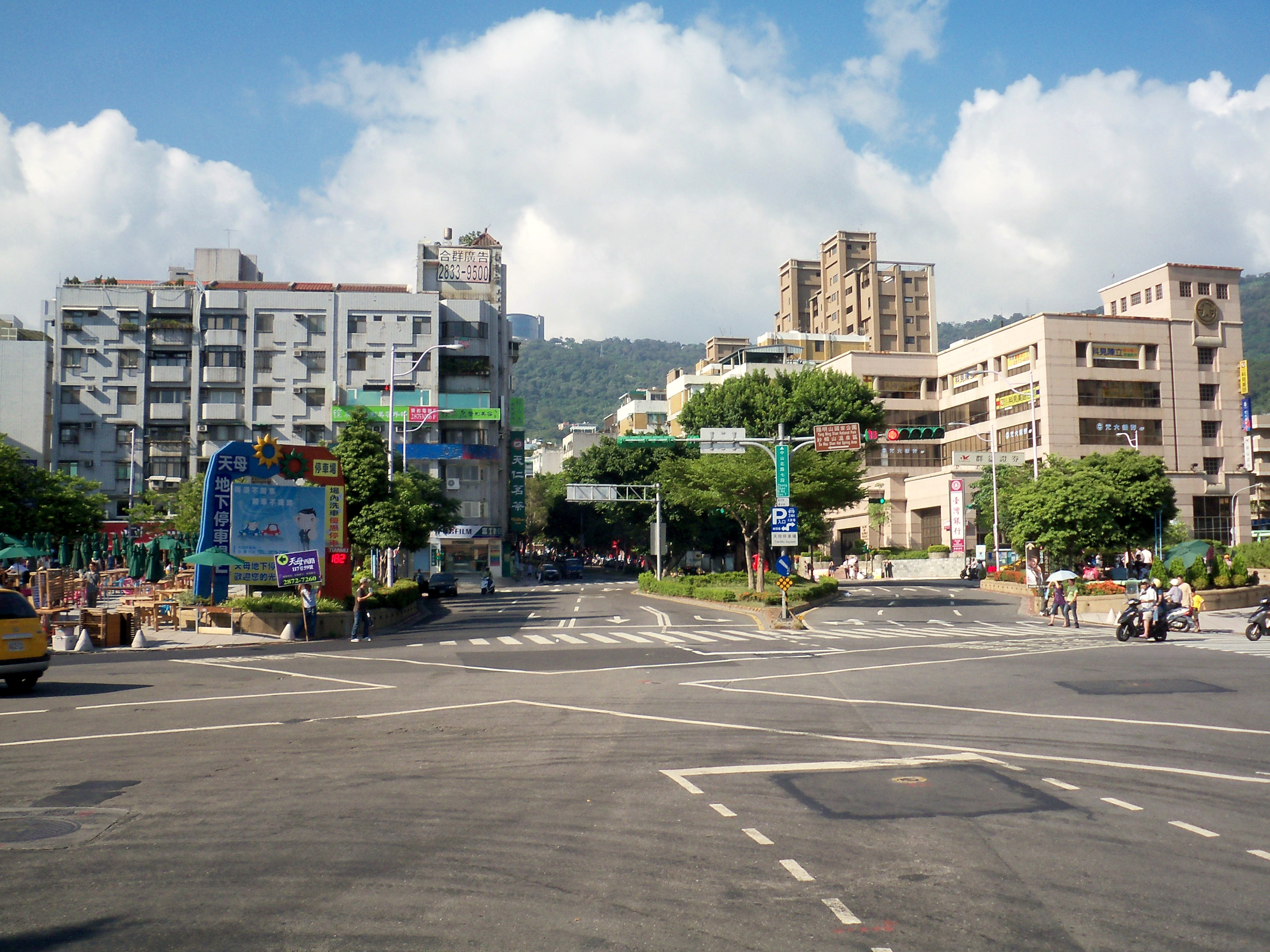 天母プラザ（台北市士林区中山北路六・七段と天母東・西路の交差点）。